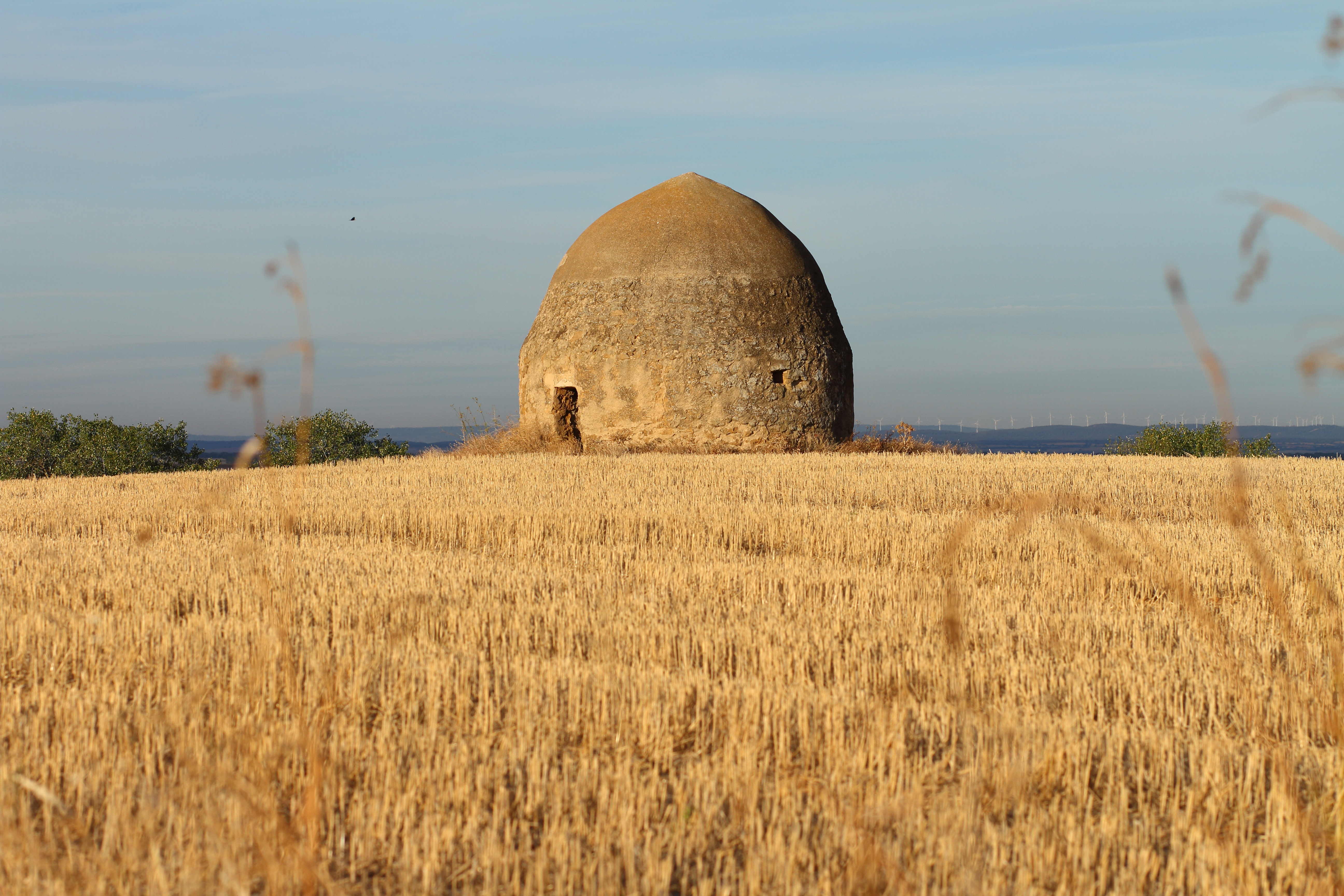 Vidayanes, hono de los Vegas, 02